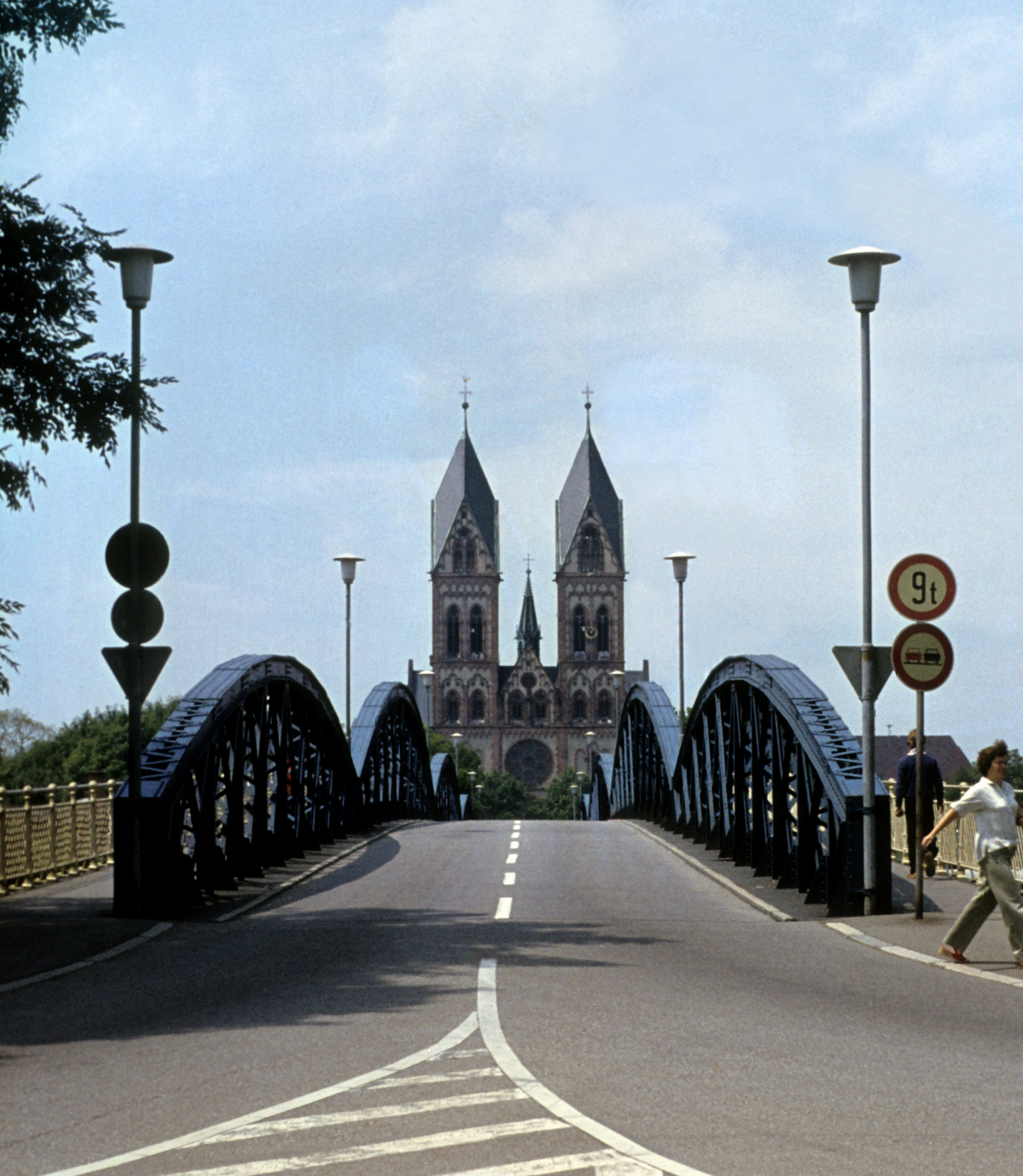 Die Stühlingerbrücke -jetzige Wiwilibrücke- auf dem sich der normale Straßenverkehr zwischen dem Stadtteil Stühlinger und der Innenstadt abwickelte.